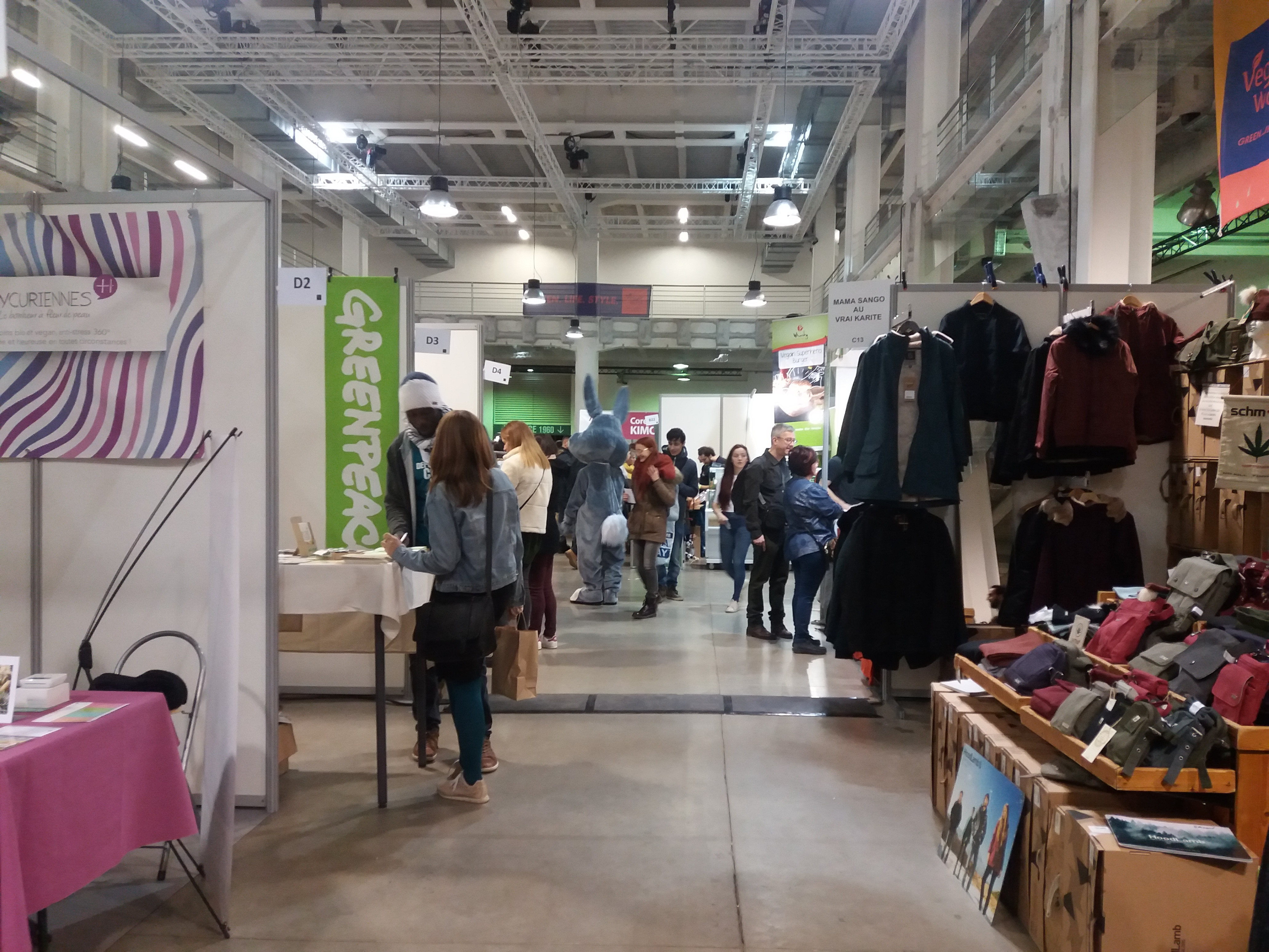 Allée principale avec un lapin.